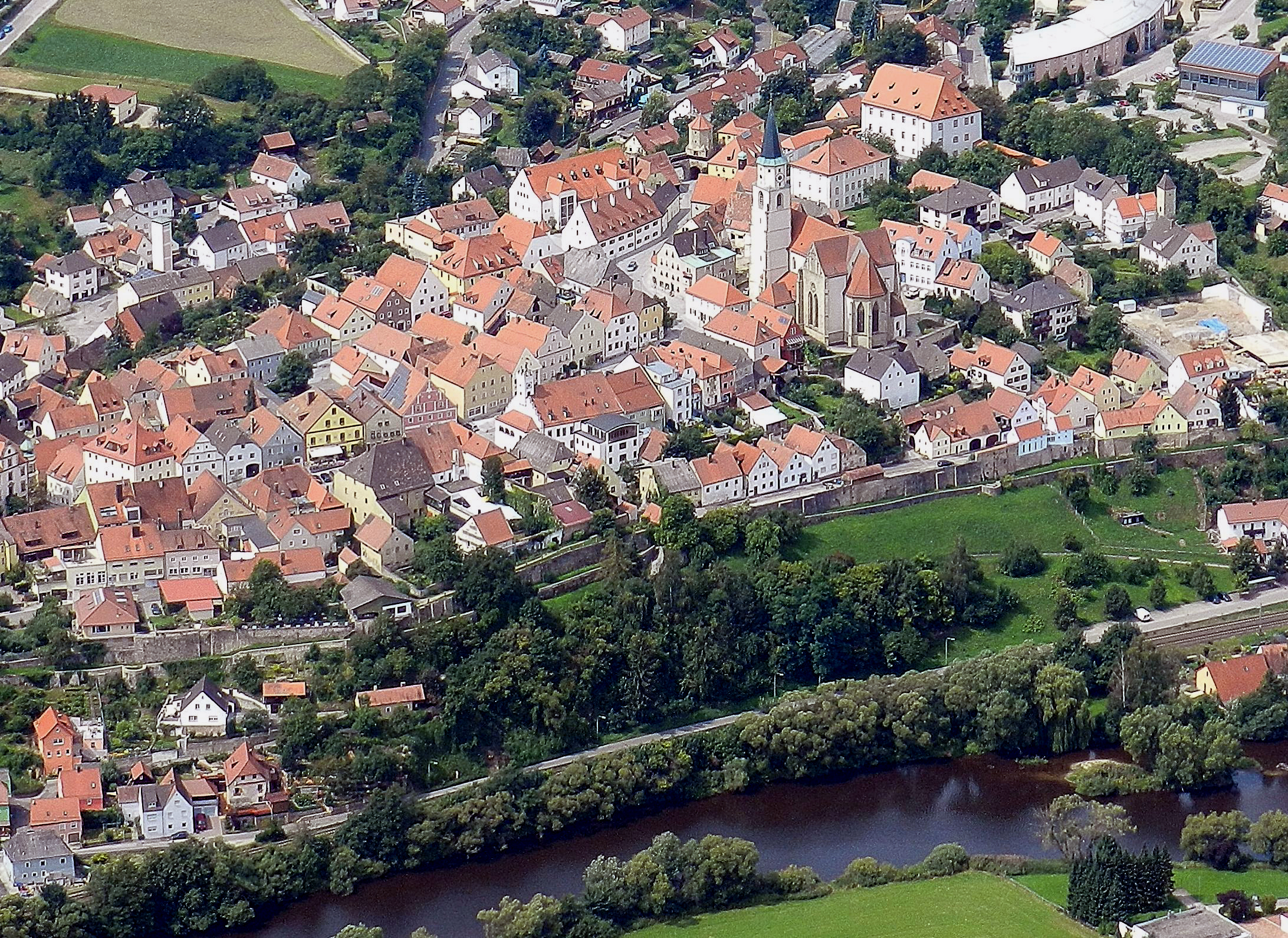 Nabburg an der Naab (Stadtkern), Landkreis Schwandorf, Oberpfalz, Bayern (2011)